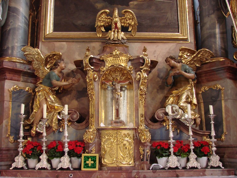 Stadtpfarrkirche Dietfurt, Tabernakel mit Anbetungsengeln